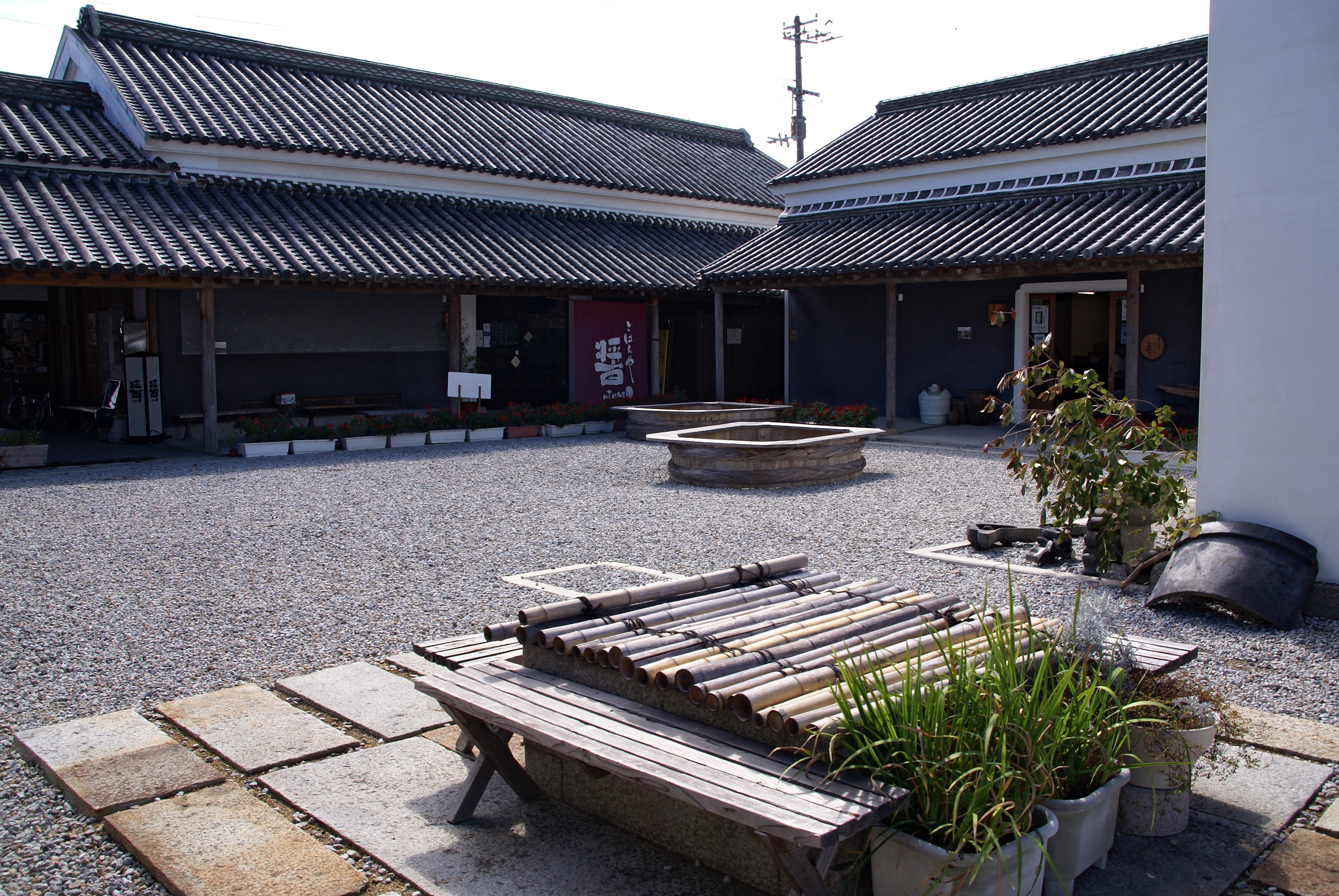 Sanshu Idutsu-yashiki in Hiketa, Higashikagawa, Kagawa prefecture, Japan